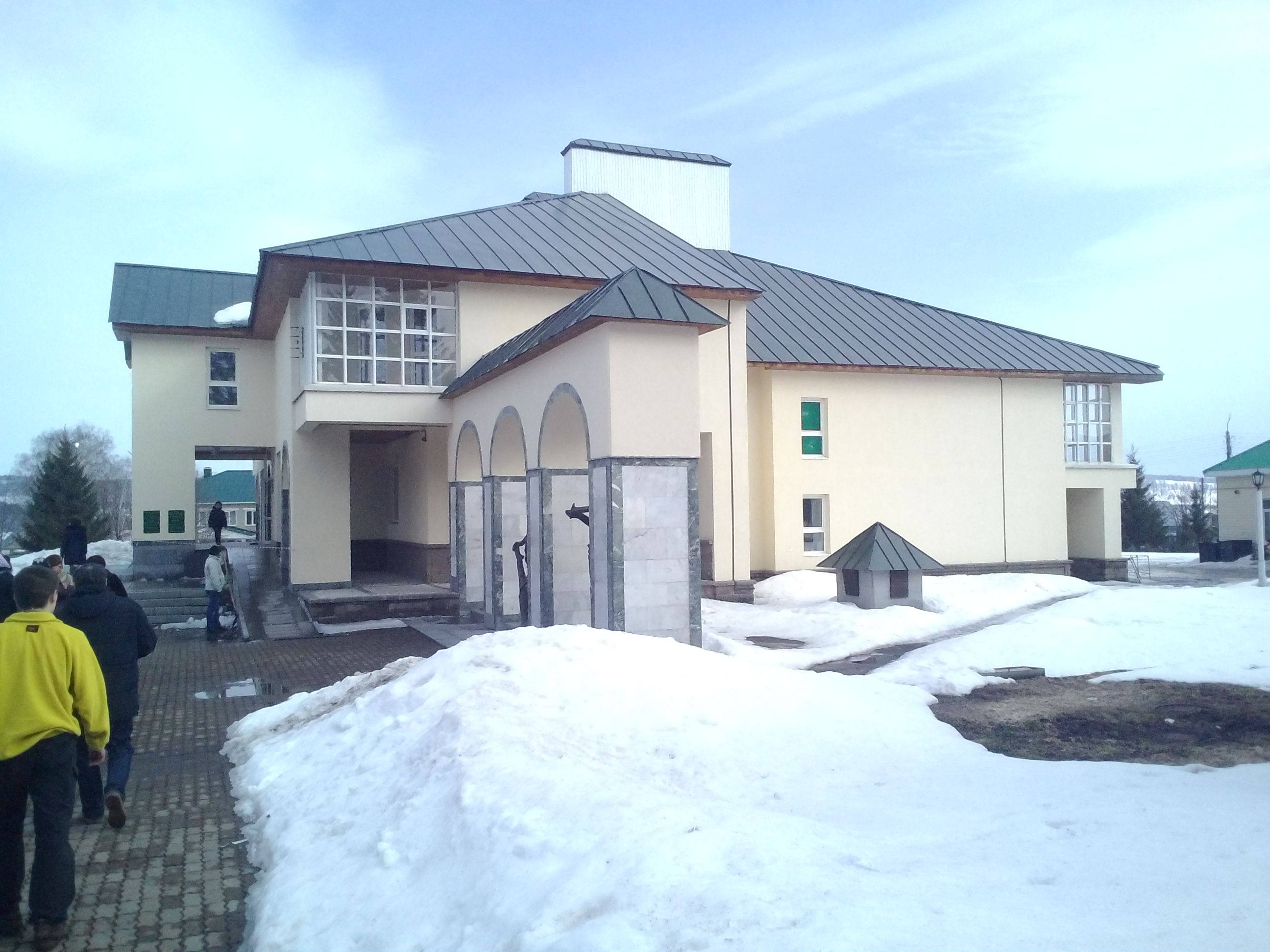 Музей Салавата Юлаєва у с. Малояз